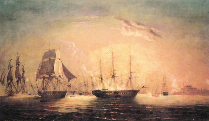 La escena describe la captura de la fragata española Esmeralda en el puerto del Callao el 6 de noviembre de 1820 por la fuerzas chilenas al mando de lord Cochrane